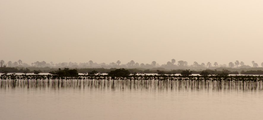 Mangrove Sine Saloum / Pépinière rhizome palétuvier This is an image with the theme "Africa on the Move or Transport" from: Senegal